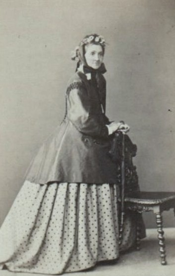 Мария Фёдоровна Ростовская, урожденная Львова (1815 — 1872)